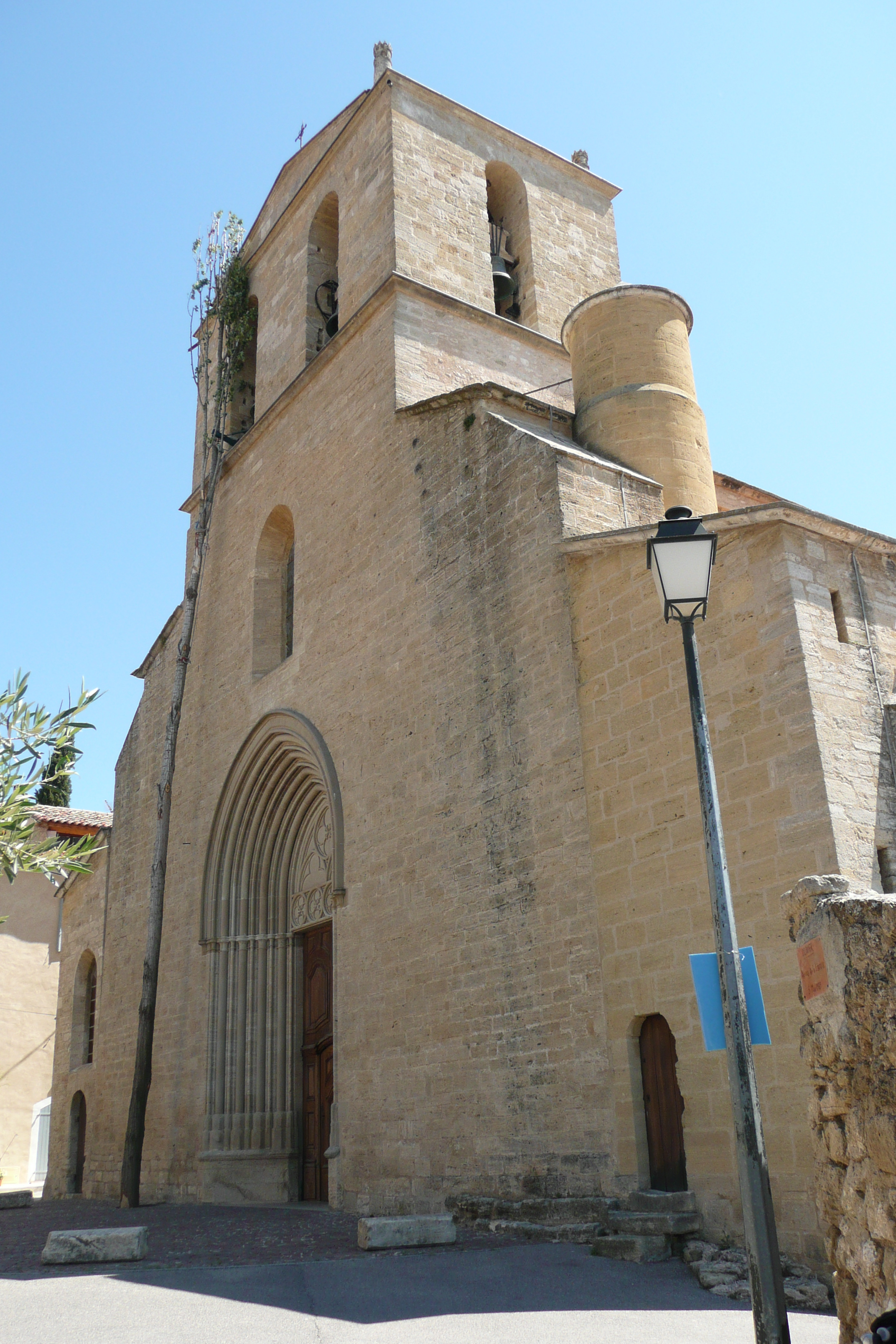 Église Notre-Dame-de-Beaulieu de Cucuron (Vaucluse, France).